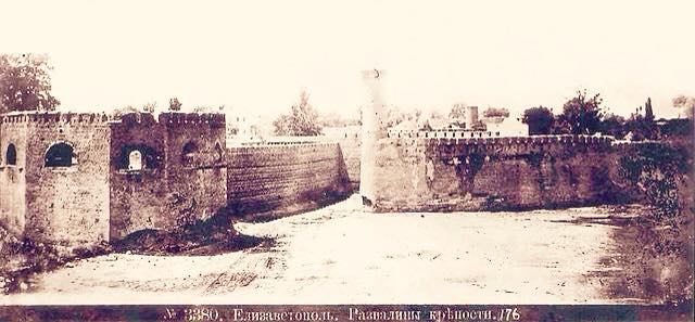 Развалины гянджинский крепости